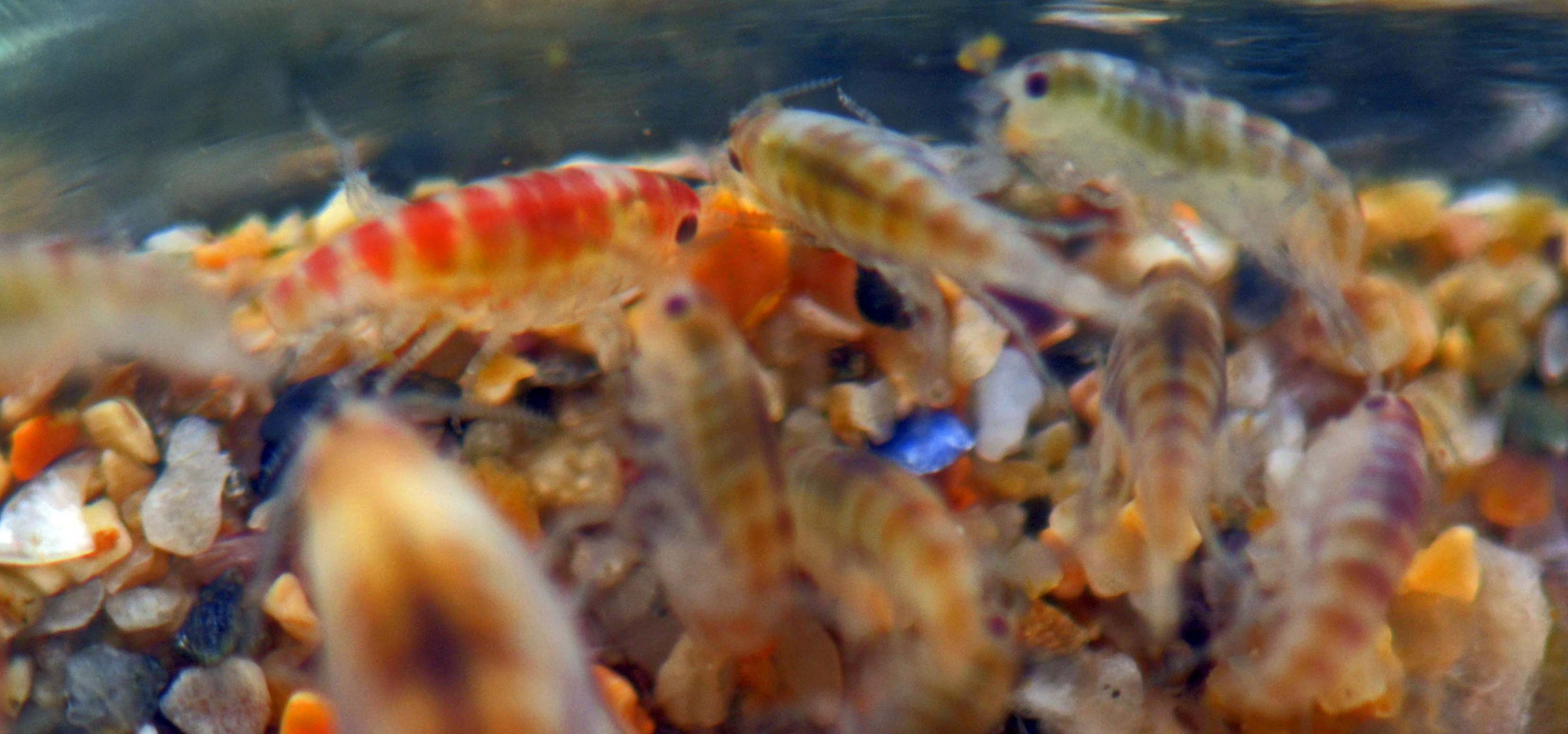 Talitrus saltator (ici dans un bocal de verre), sur la plage de la Palue, près du Cap de la Chèvre, sur la presqu'île de Crozon, dans le Finistère (Ouest de la France)